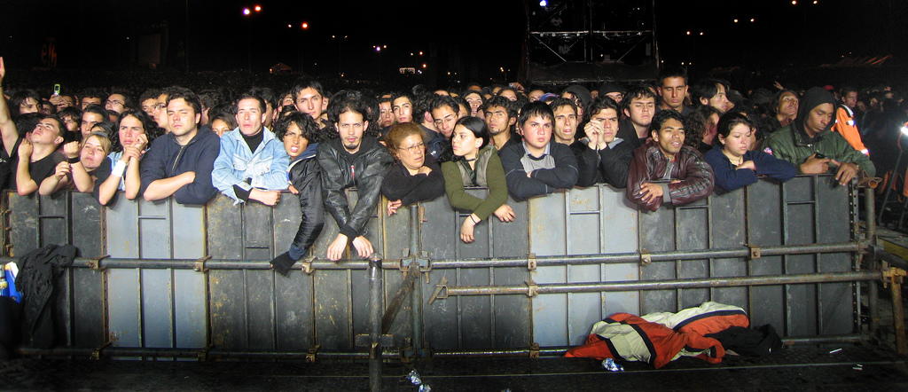 Concierto de Rock al parque. Bogota, Colombia.